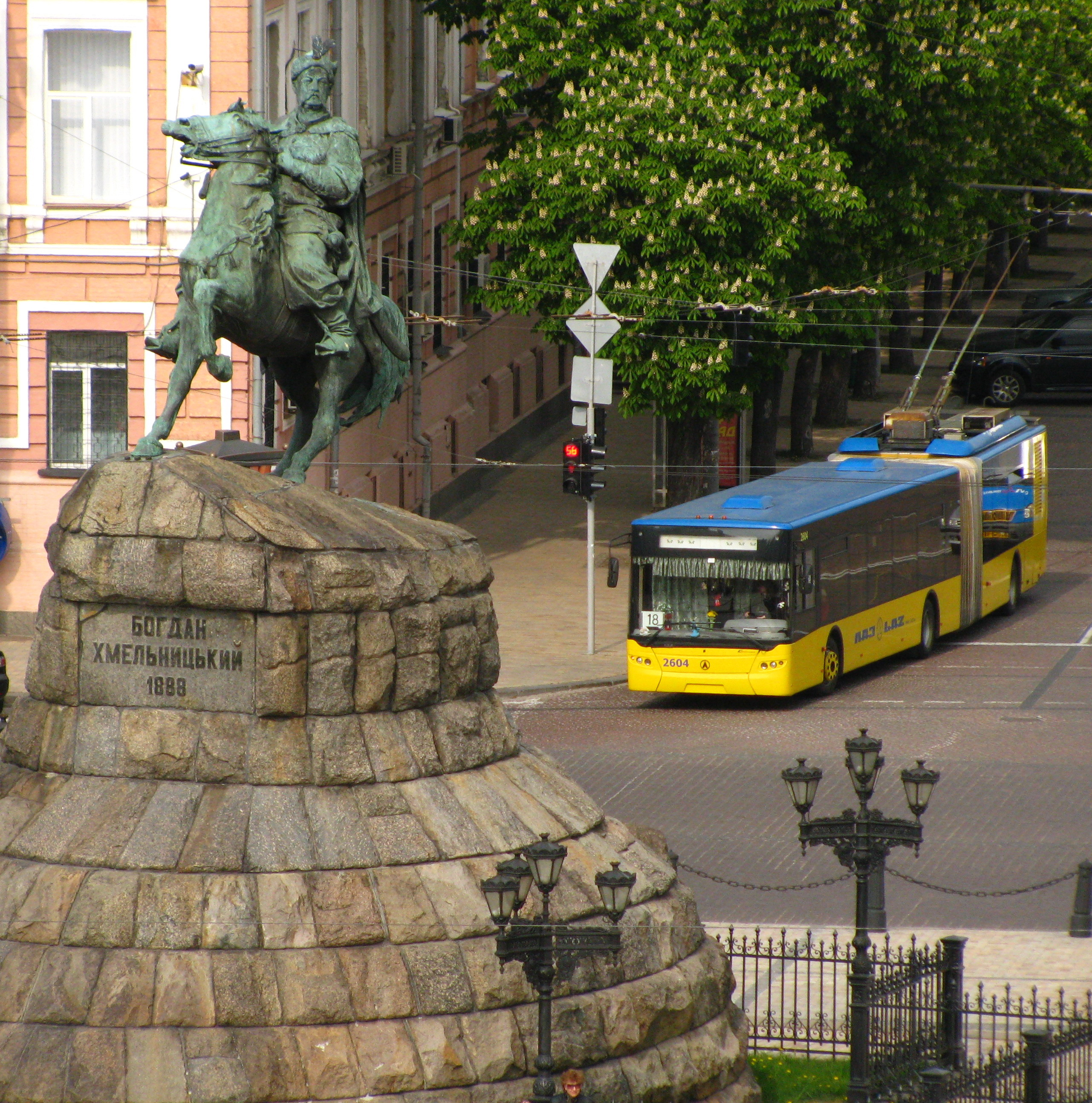 Тролейбус «ЕлектроЛАЗ-301» на Софійській площі у Києві. фото з дзвіниці Софійського собору